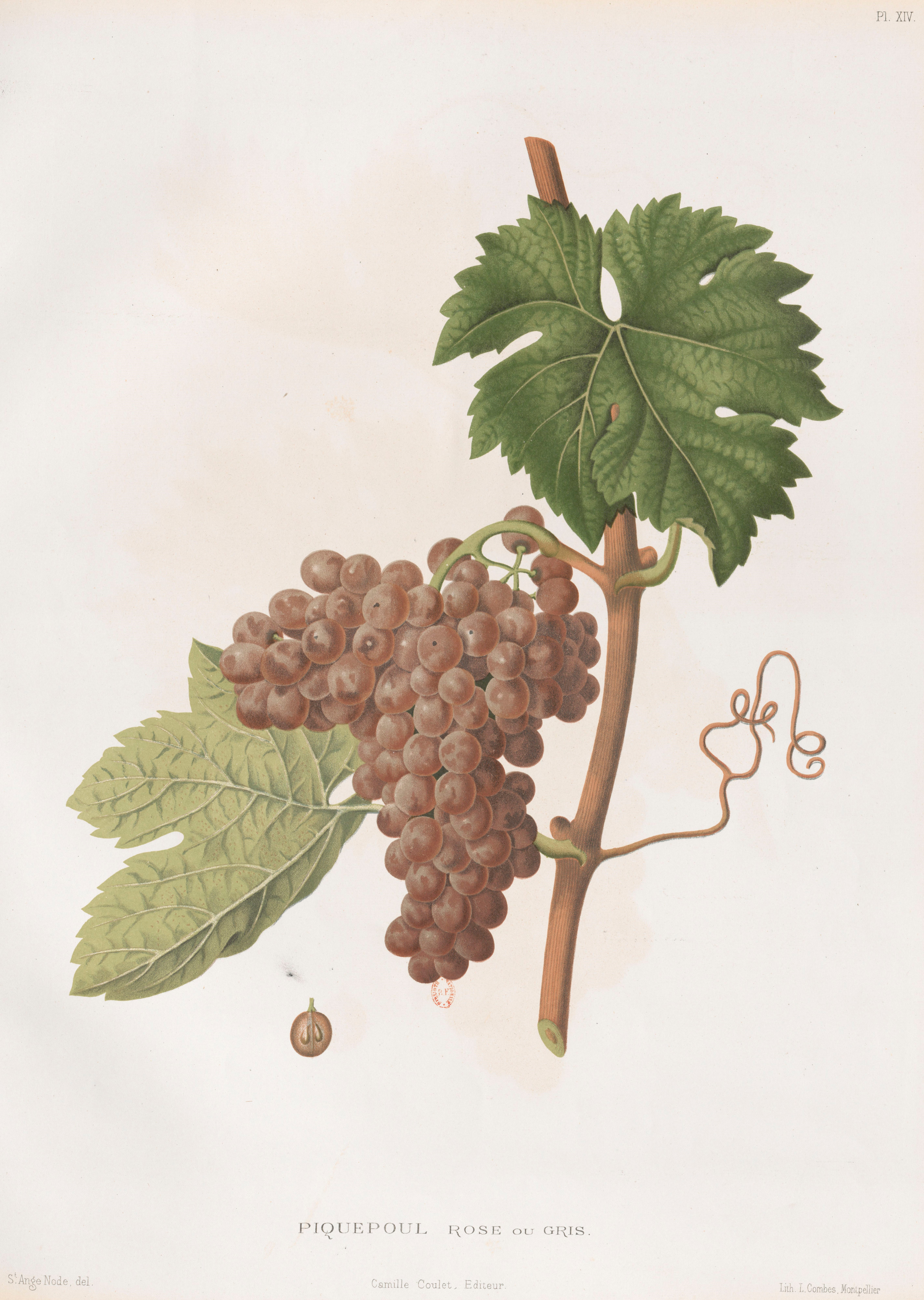 Lithographie du cépage Piquepoul rose